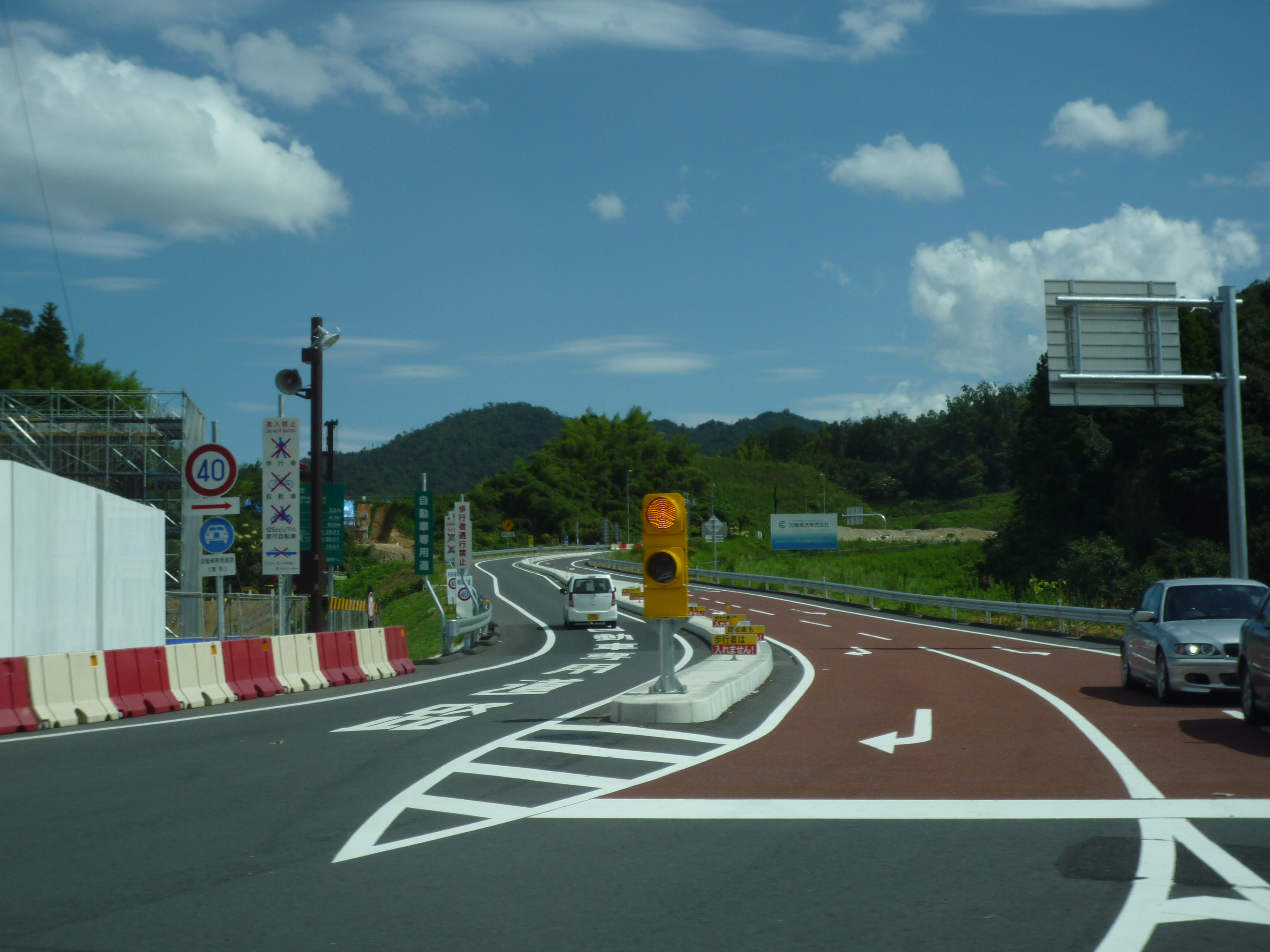 鳥取豊岡宮津自動車道宮津与謝道路 与謝天橋立インターチェンジ